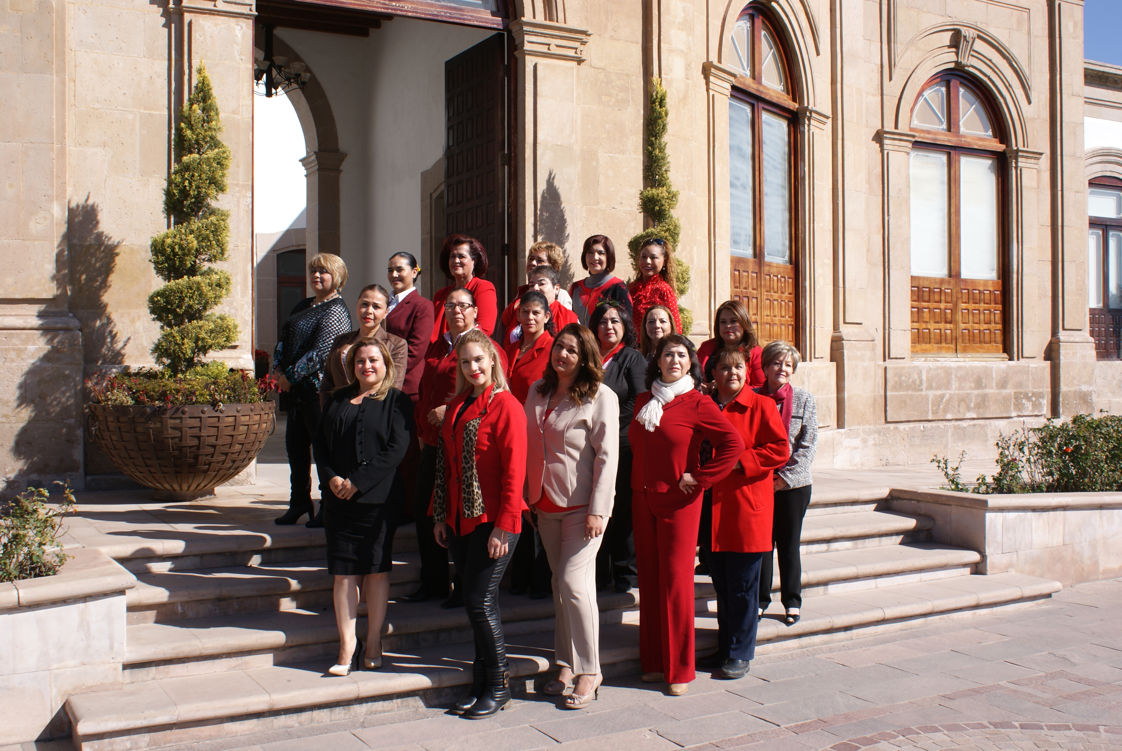 MD. Minea del Carmen Ávila González, Presidenta fundadora del Colegio Académico de Abogadas de Durango, A.C.